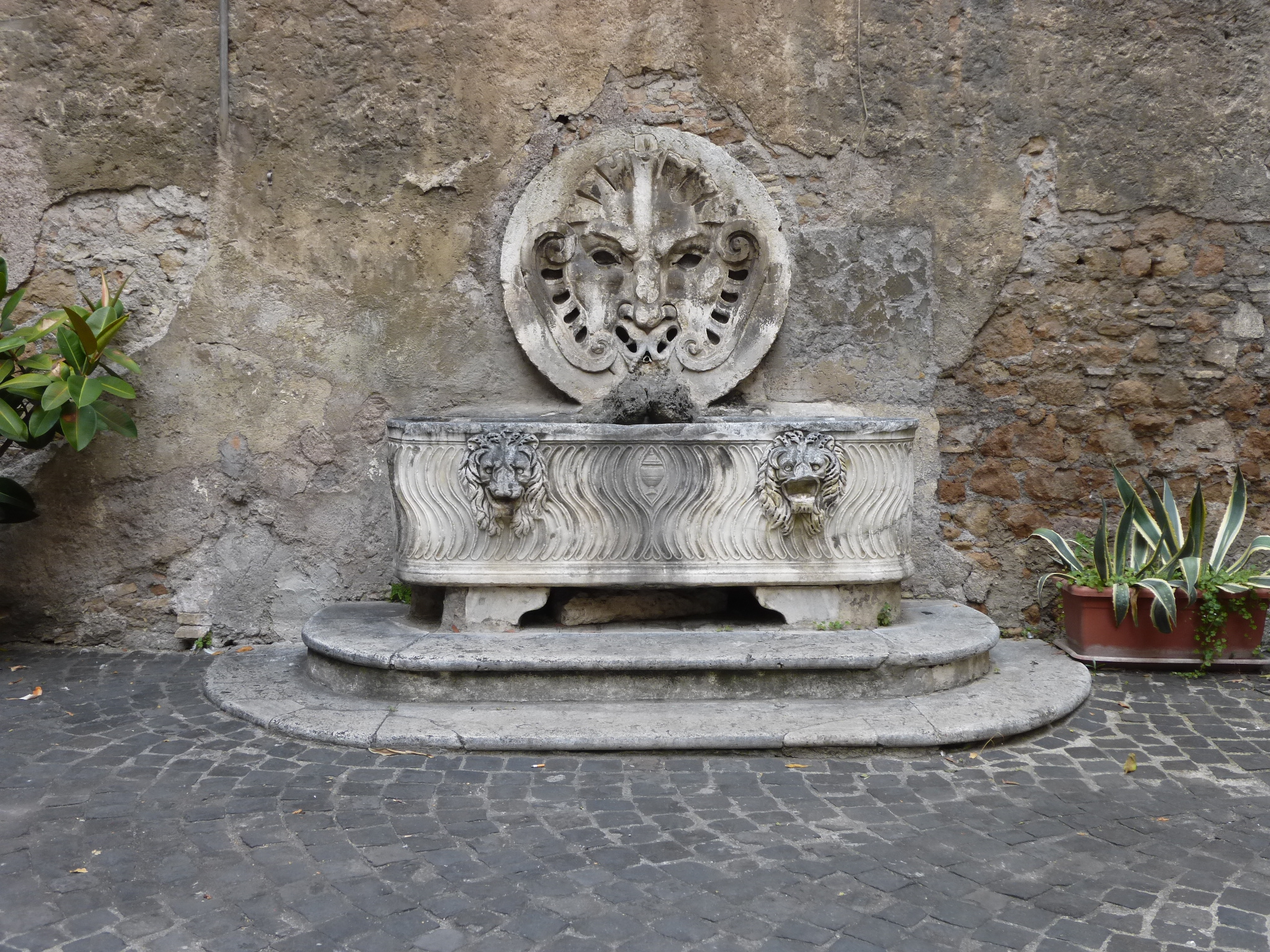 Roma, palazzo Matte di Giove.